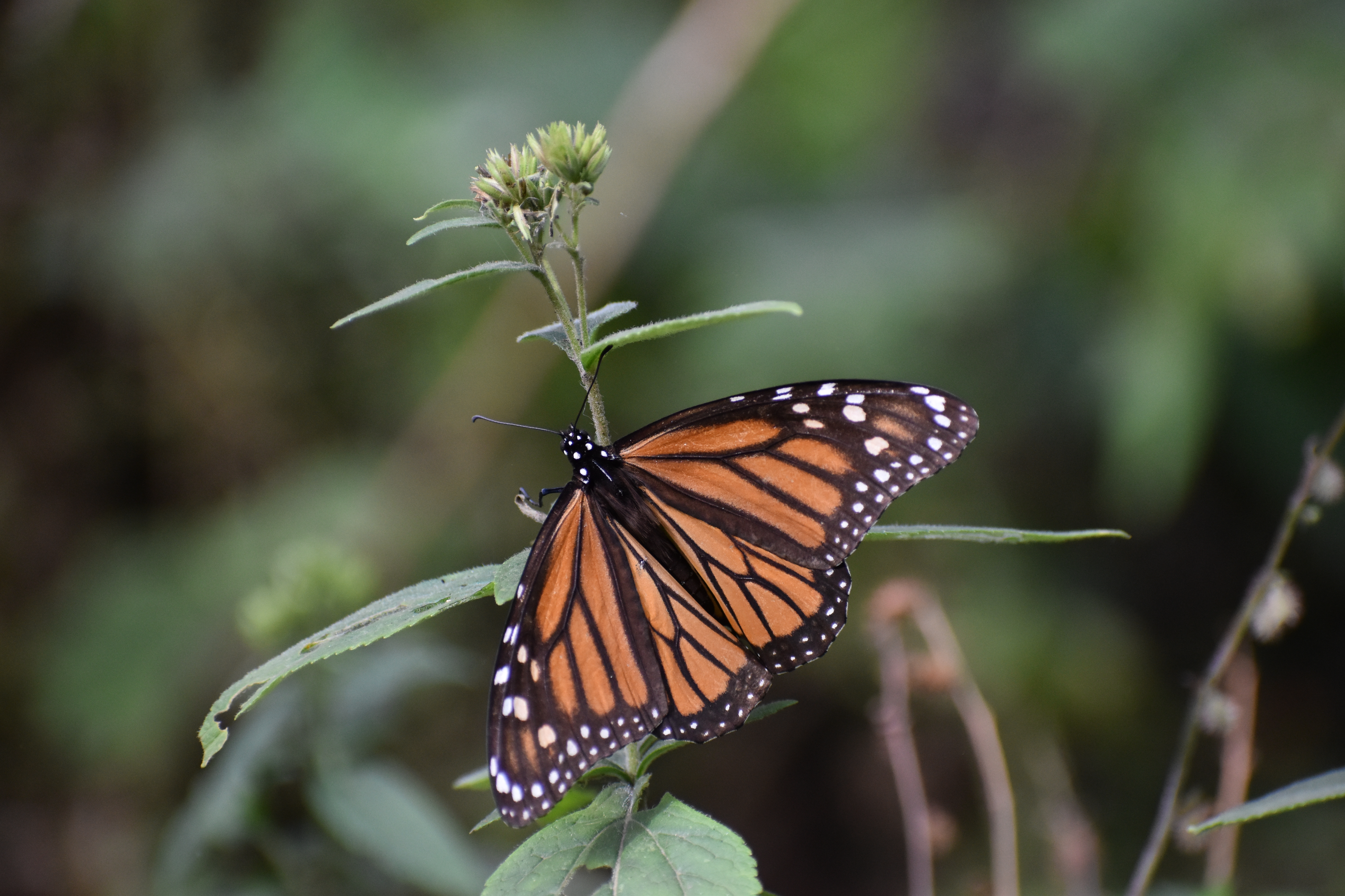 Mariposa Monarca (Danaus plexippus) esperando el calor del sol para echar a volar en el Santuario de El Rosario. Reserva de la Biosfera de la Mariposa Monarca. En el estado de Michoacán de Ocampo, México.